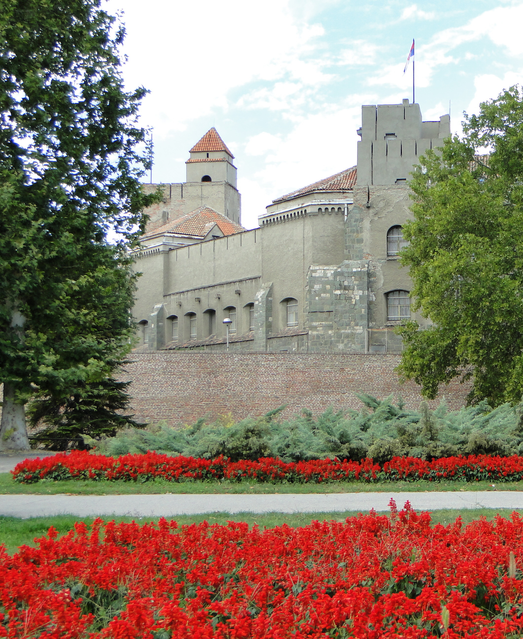 Калемегдан парк - Београд (Military museum)